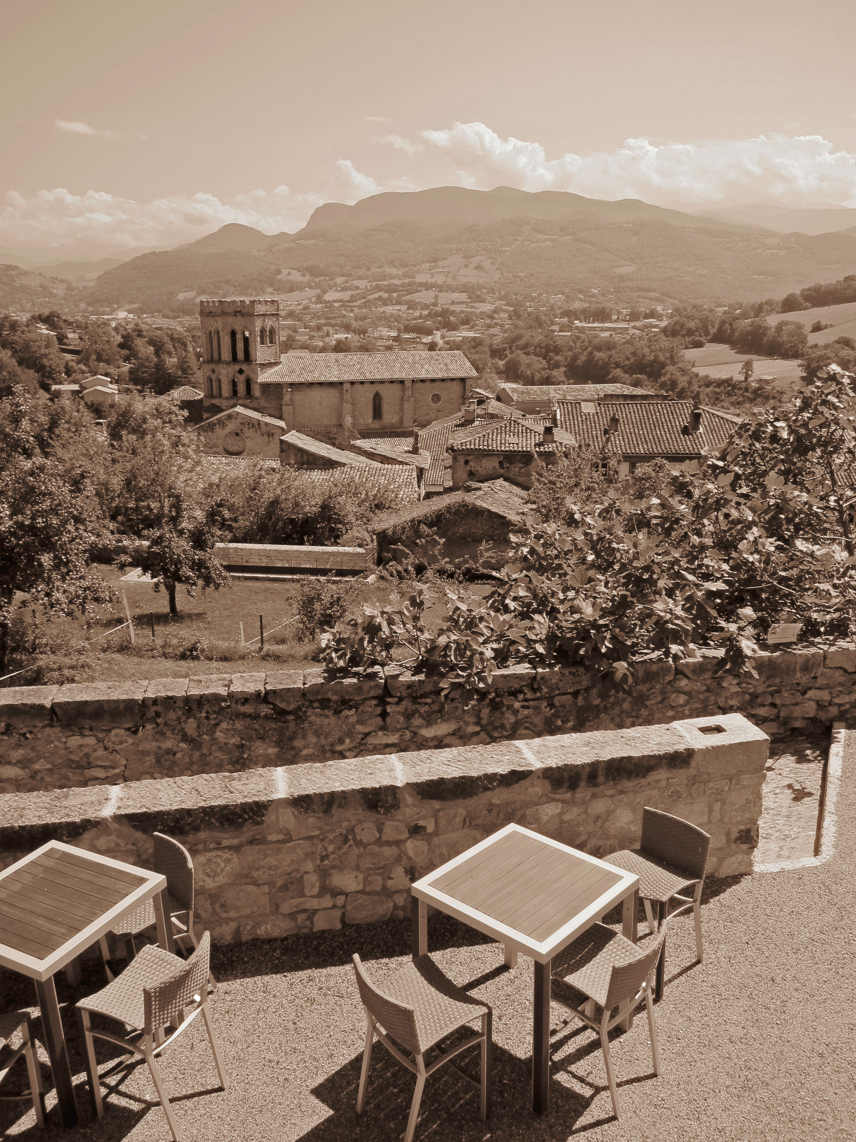 Saint-Lizier (Ariège, France) : La terrasse du restaurant Le Carré de l'Ange vue depuis le musée du Palais des Évêques. Au loin la cathédrale de Saint-Lizier et Sourroque.